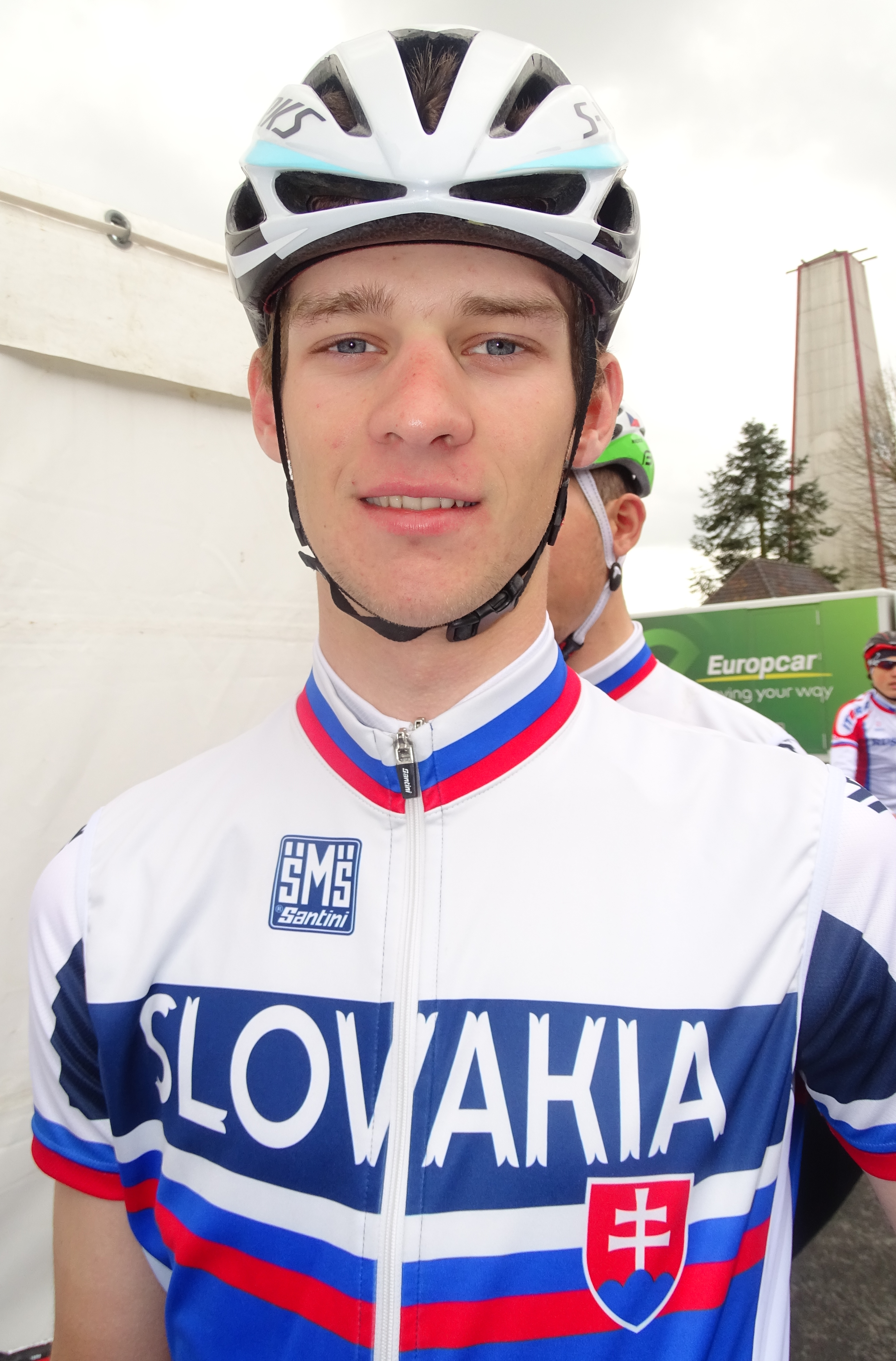 Reportage réalisé le samedi 11 avril à l'occasion du départ et de l'arrivée du Tour des Flandres espoirs 2015 à Audenarde, Belgique.